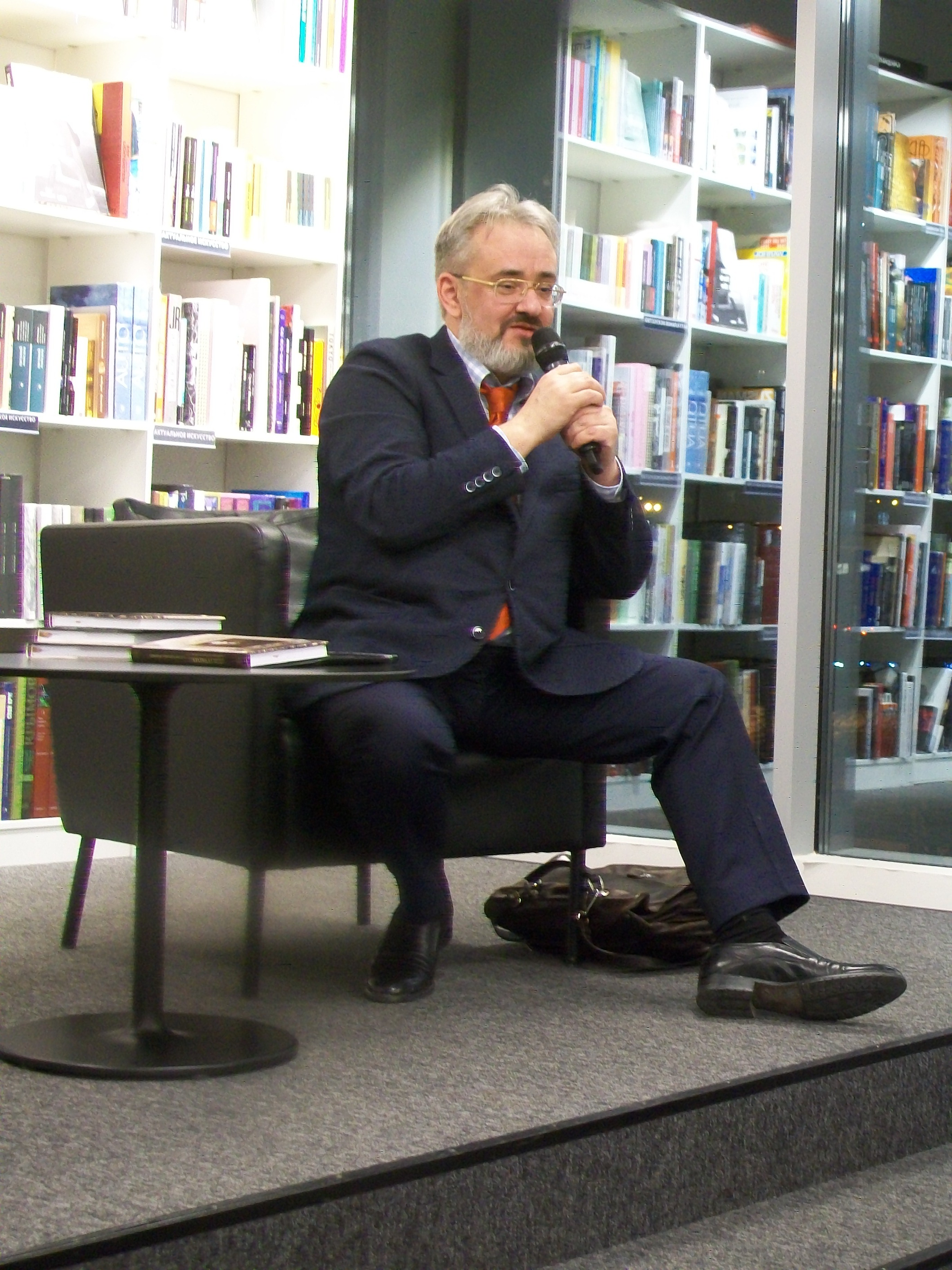 Виктор Иванович Козодой читает лекцию об А.И. Гучкове рядом со своими книгами. Екатеринбург, Ельцин-центр, 2 марта 2017 года